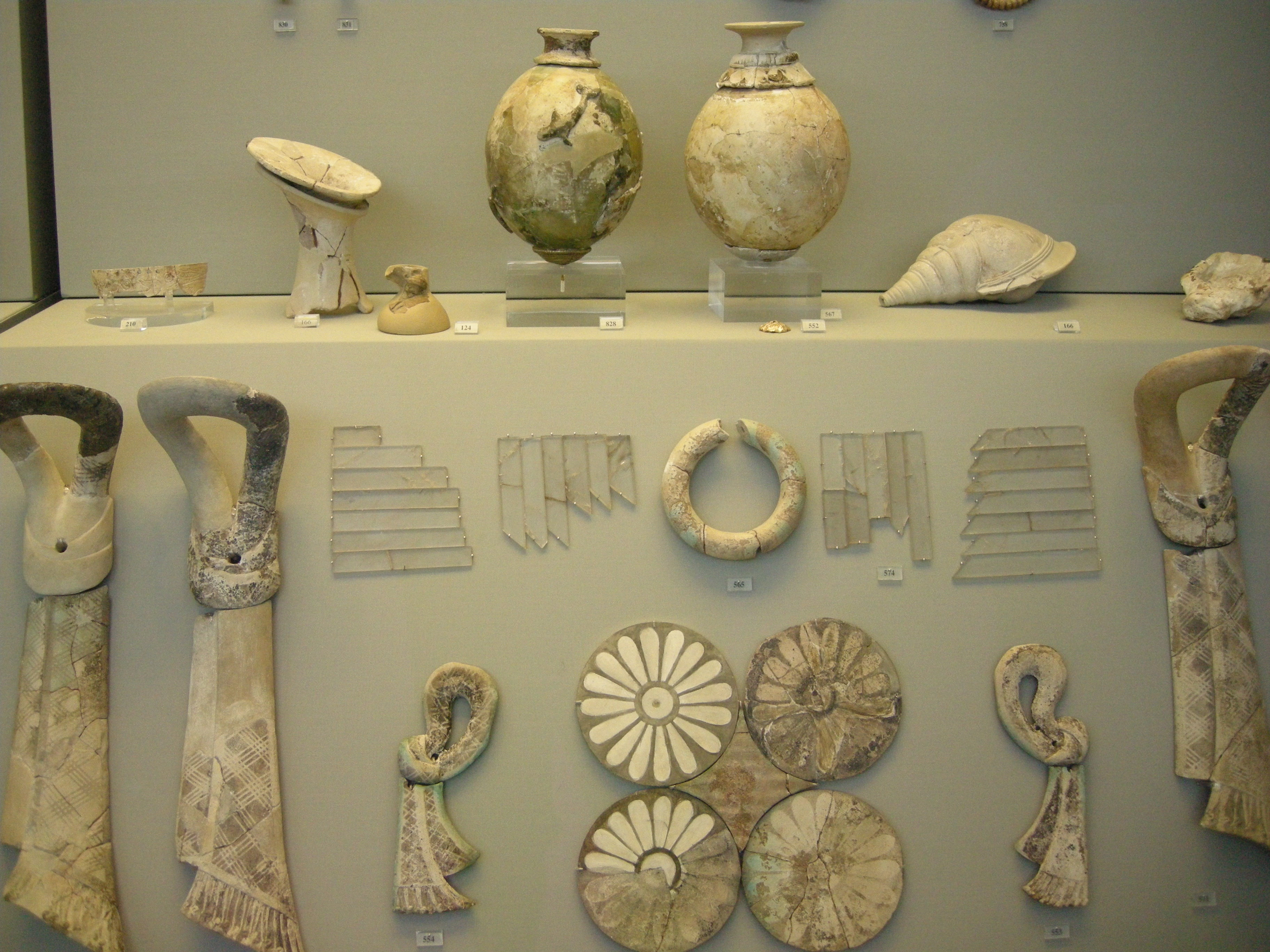 Object in NAMA